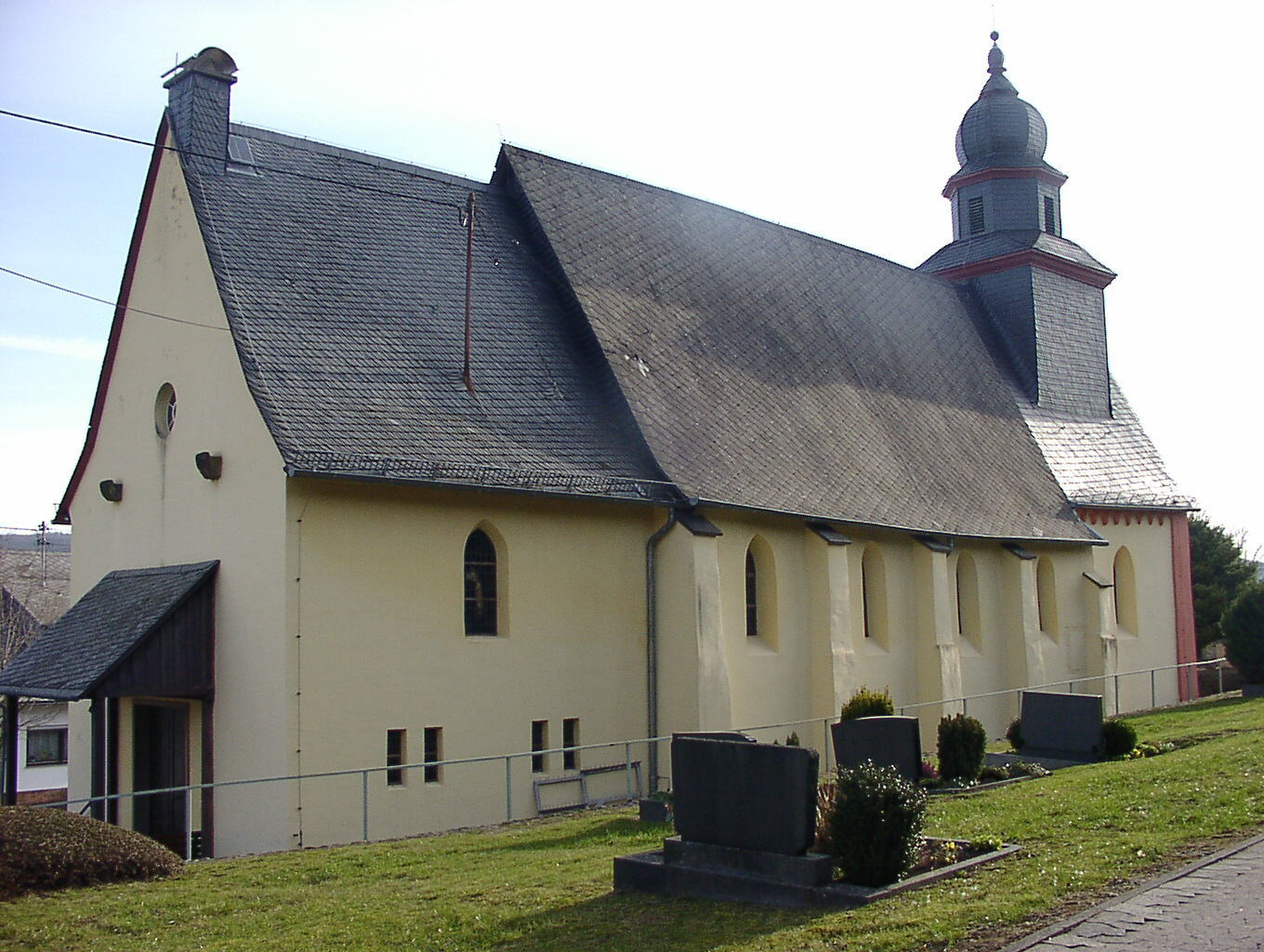 Die Sankt Peter Kirche vom Bopparder Ortsbezirk Weiler